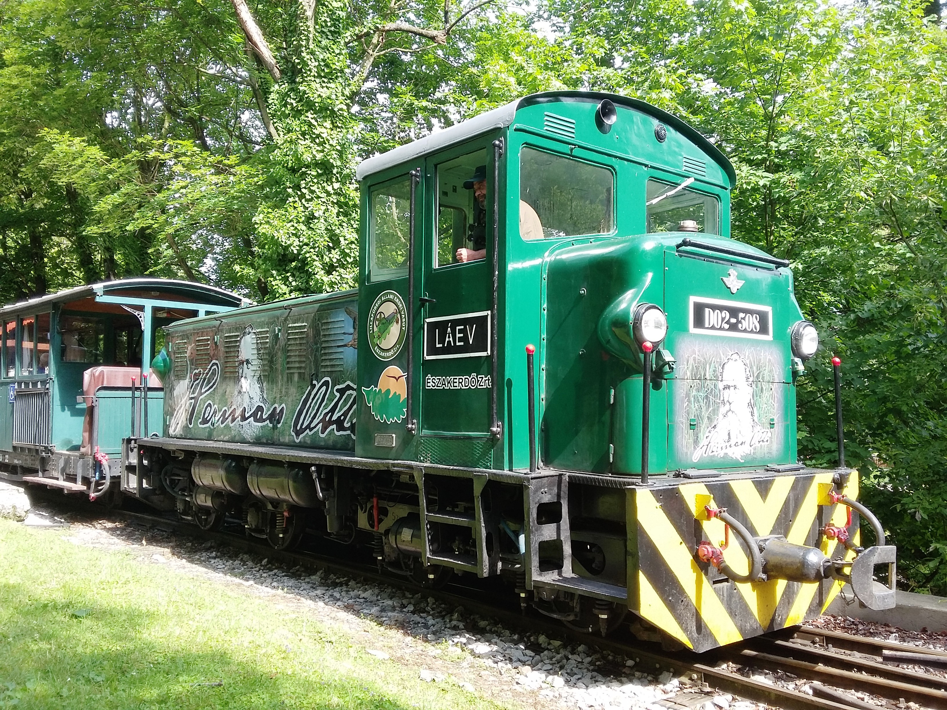 2015. Herman Ottó emlékmozdony